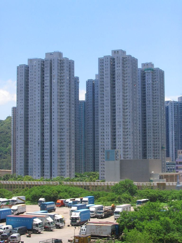 坑口-安寧花園 On Ning Garden, Hang Hou